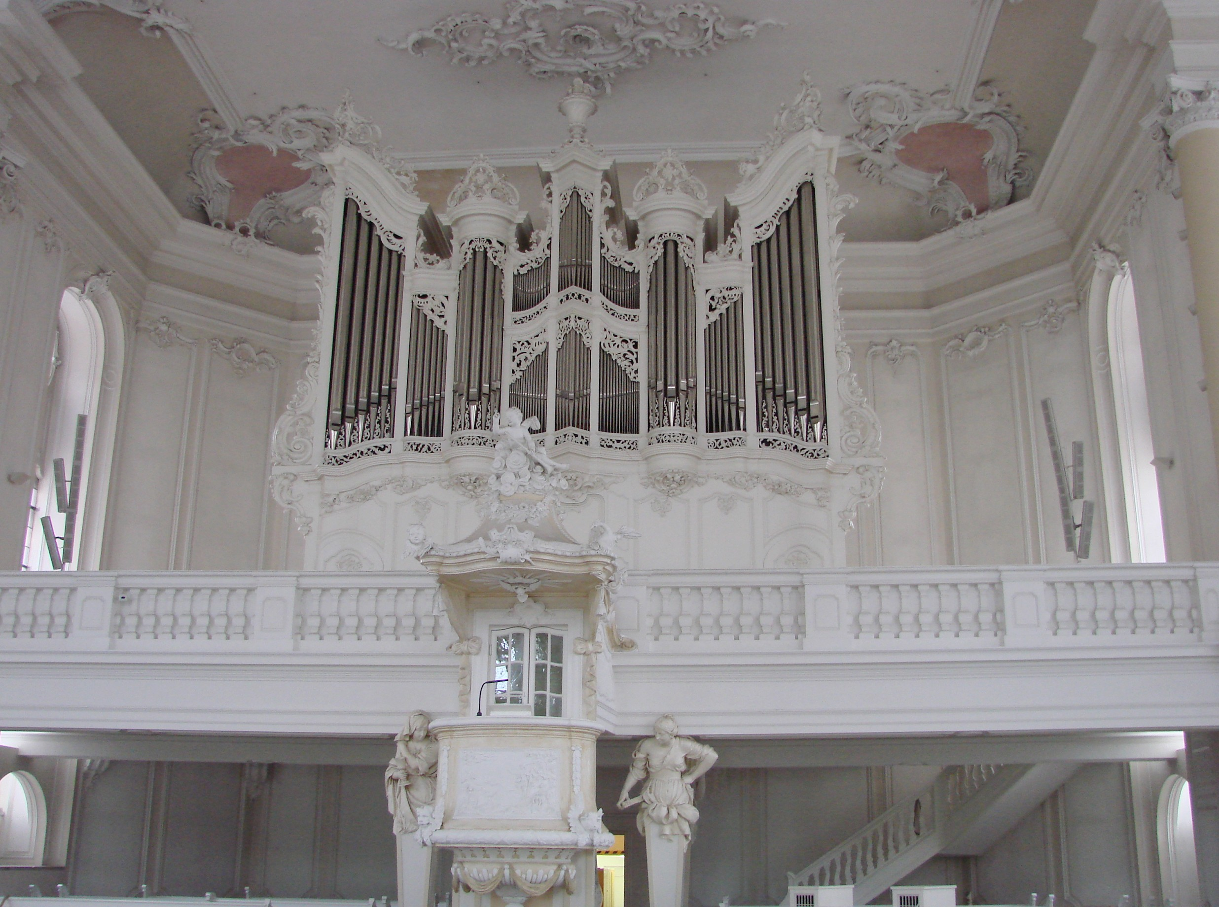 Ludwigskirche in Saarbrücken, Germany: Organ Gallery and Lectern